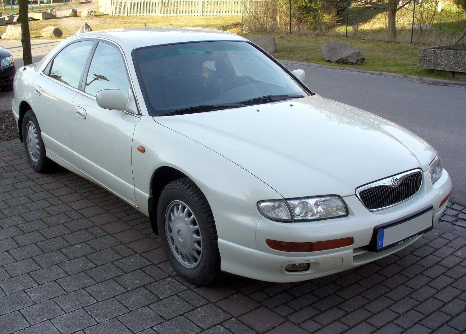 Mazda Xedos 9